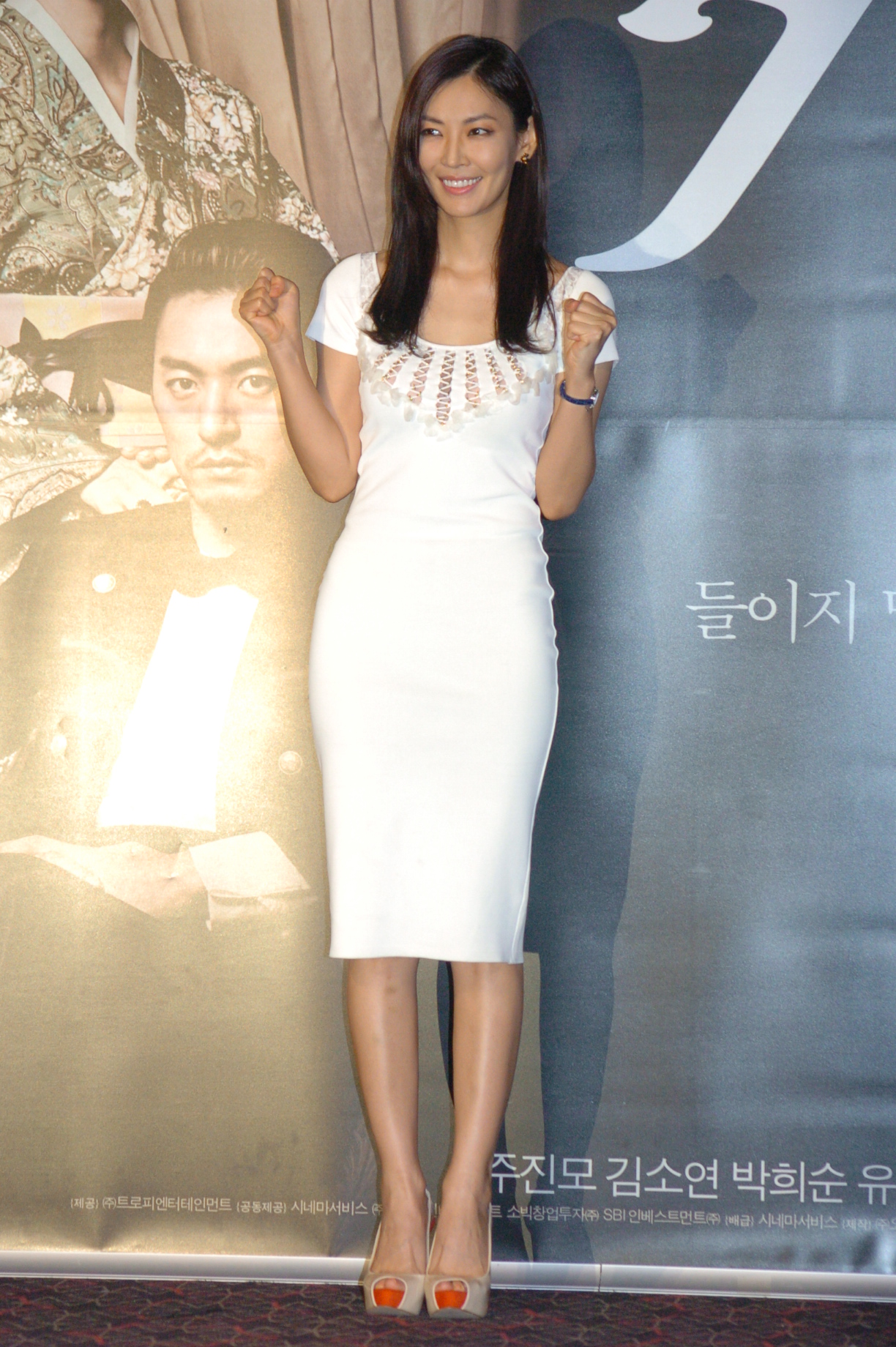 가비 시사회